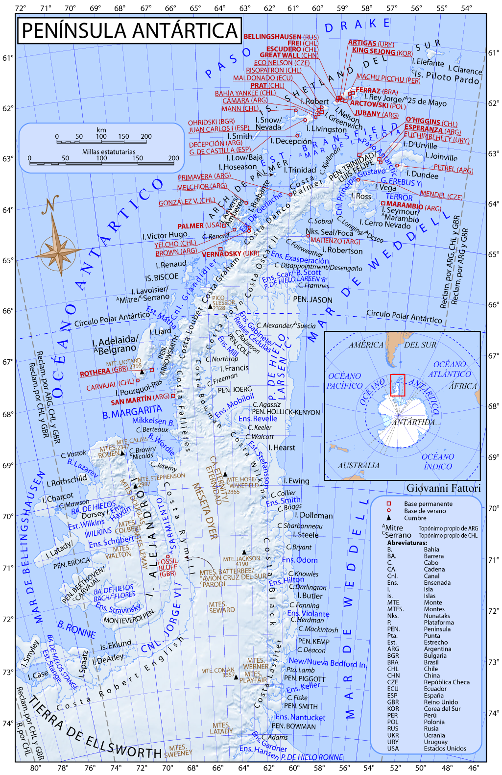 mapa de la península Antártica, idioma español, bases científicas, proyección cónica equidistante b. paralelo s. 1: -65. paralelo s. 2: -71. Merid. ctral.:-62. Relieve sombreado. Datos relieve sombreado: NASA.